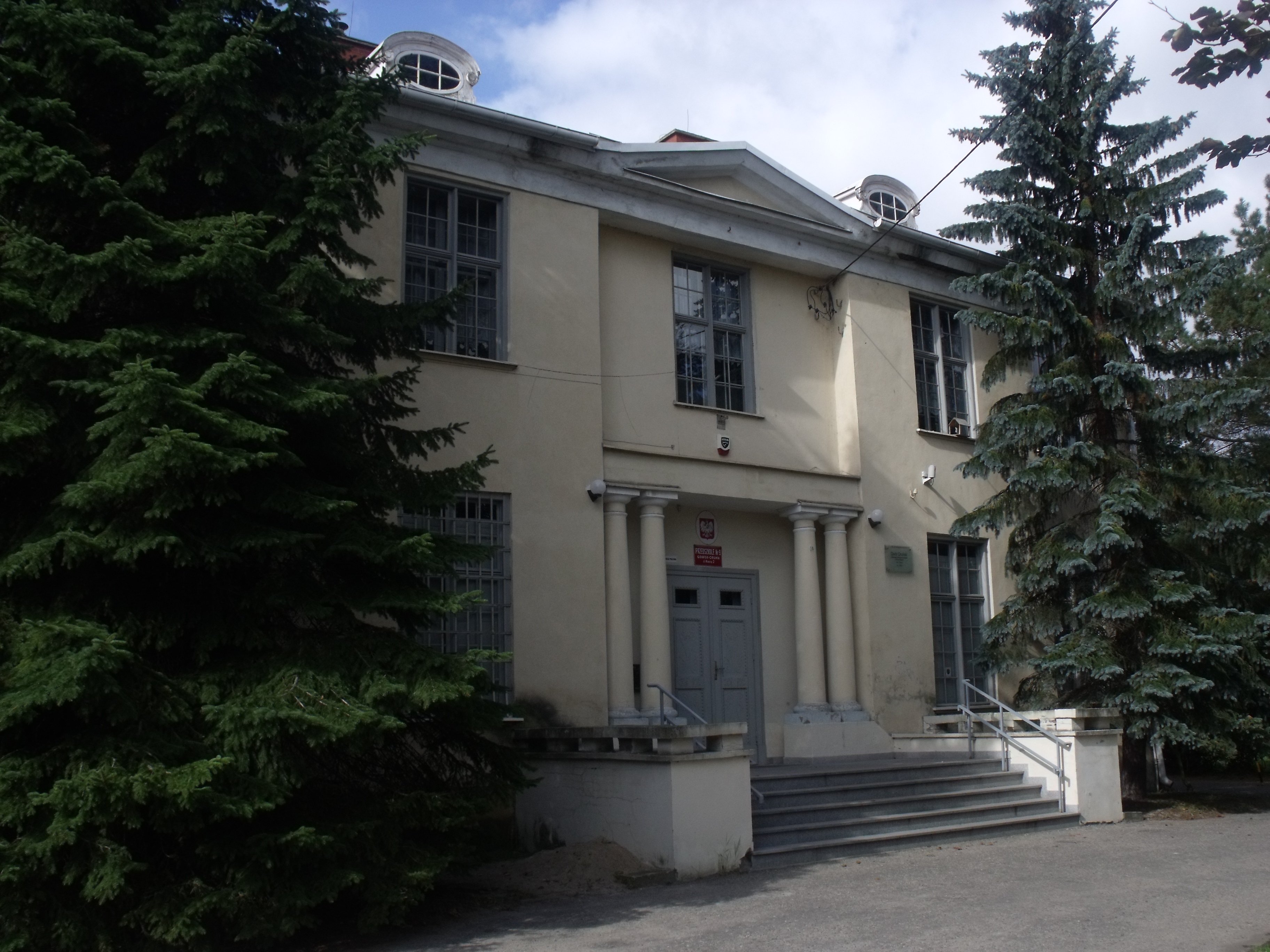 Gdańsk Orunia, ul. Nowiny 2 - zespół dworsko-parkowy (dwór, park lodownia, dwa budynki gospodarcze) w granicach określonych na załączniku graficznym nr 1 i nr 2 do decyzji